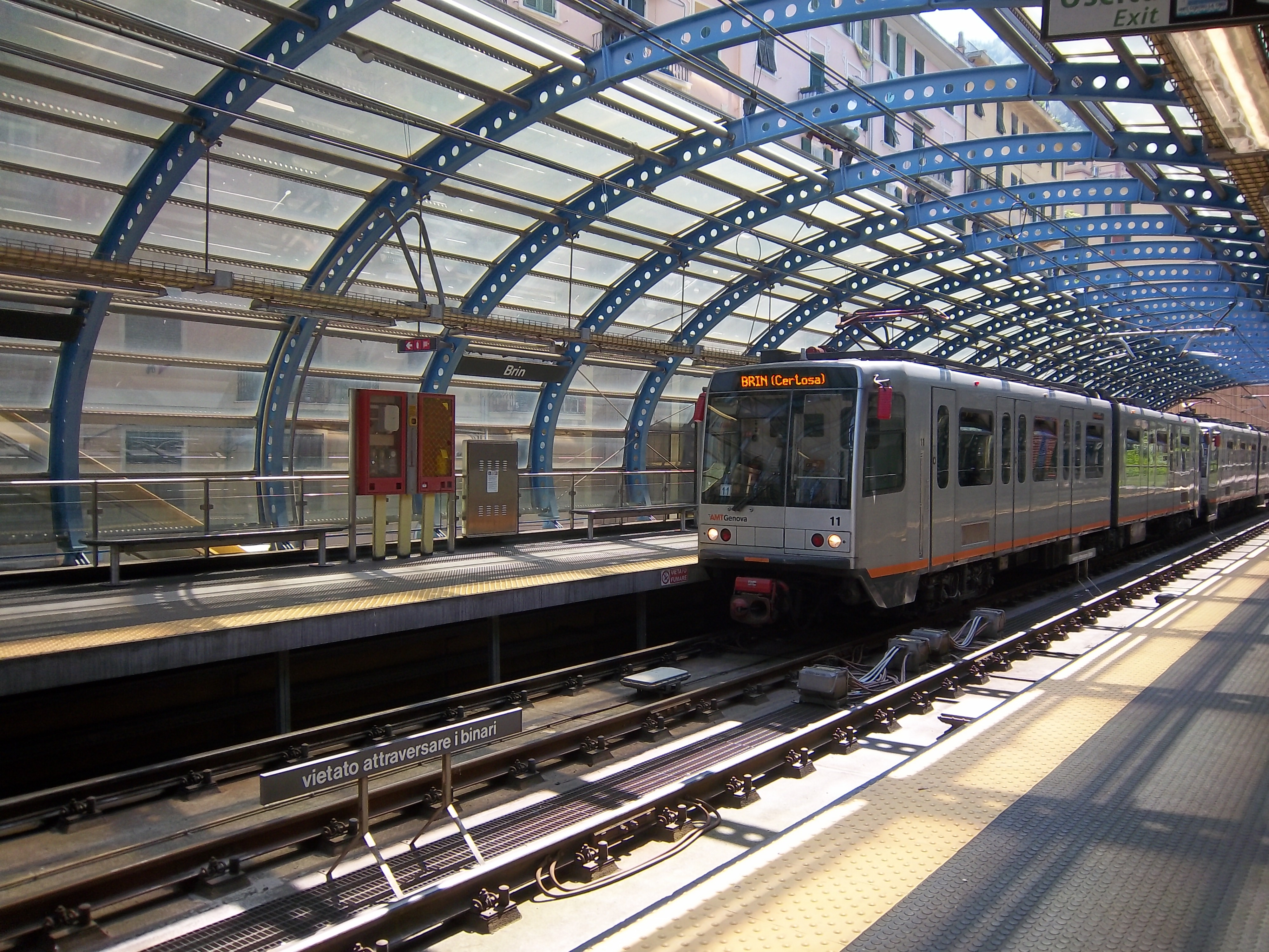 Stazione di Brin della Metropolitana di Genova